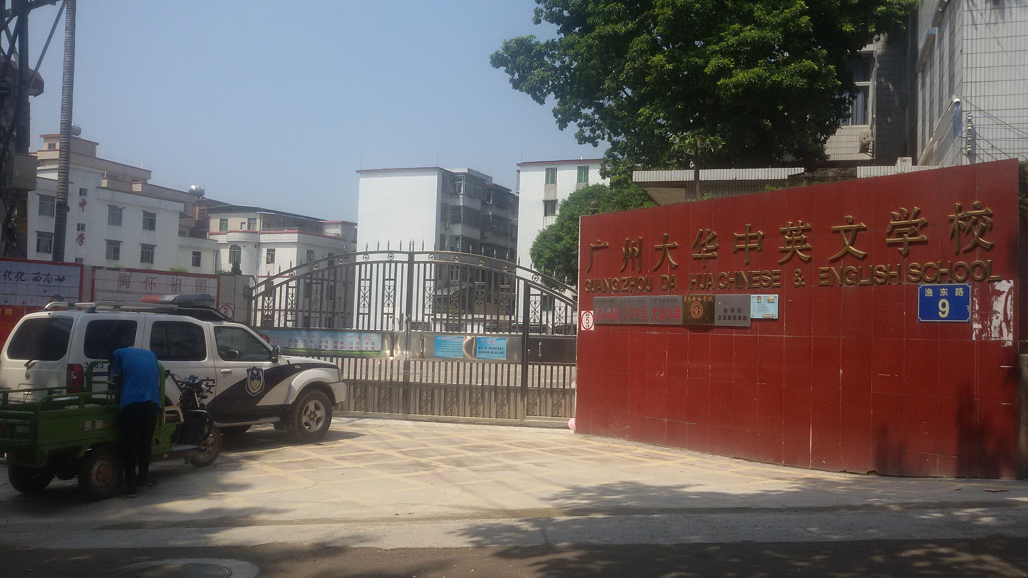 粵語: 廣州大華中英文學校